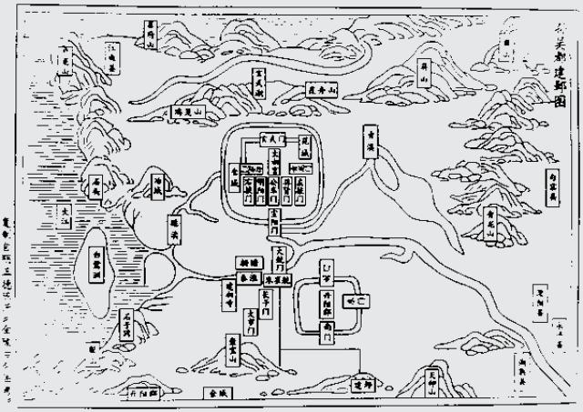 ，建邺地图，复制来自明朝陈沂所著《金陵古今图考》。